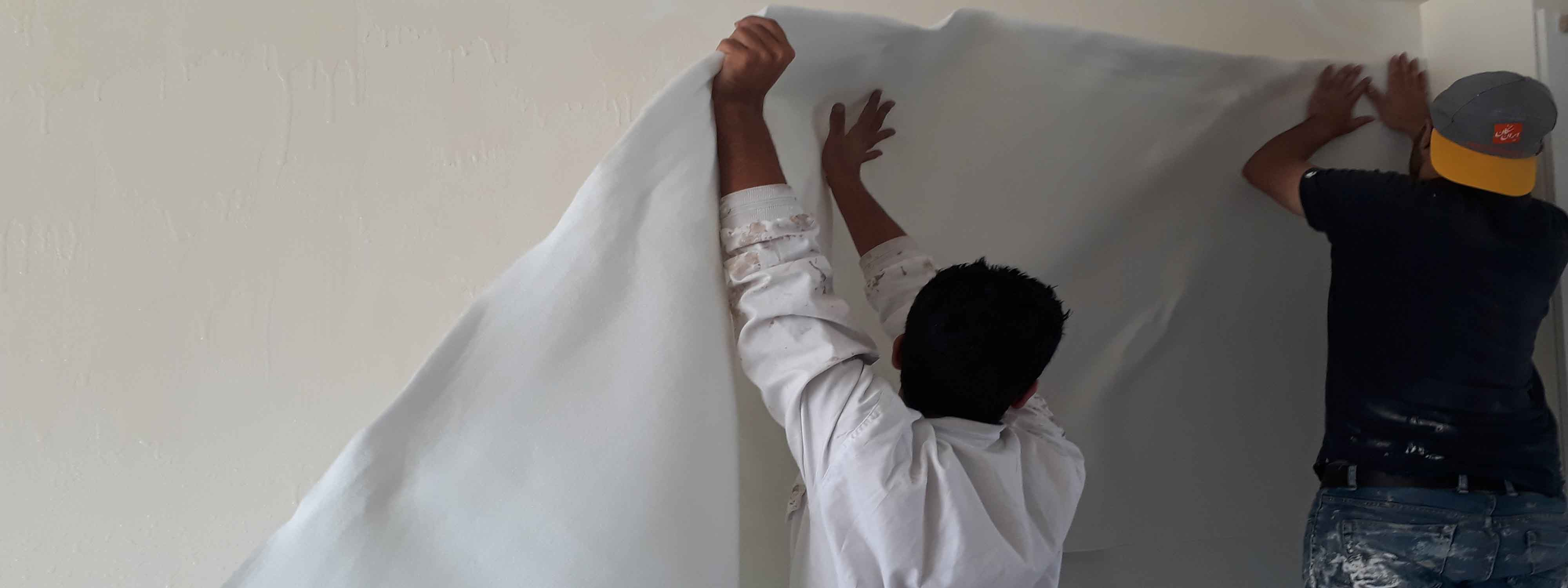 عایق حرارتی برای دیوار